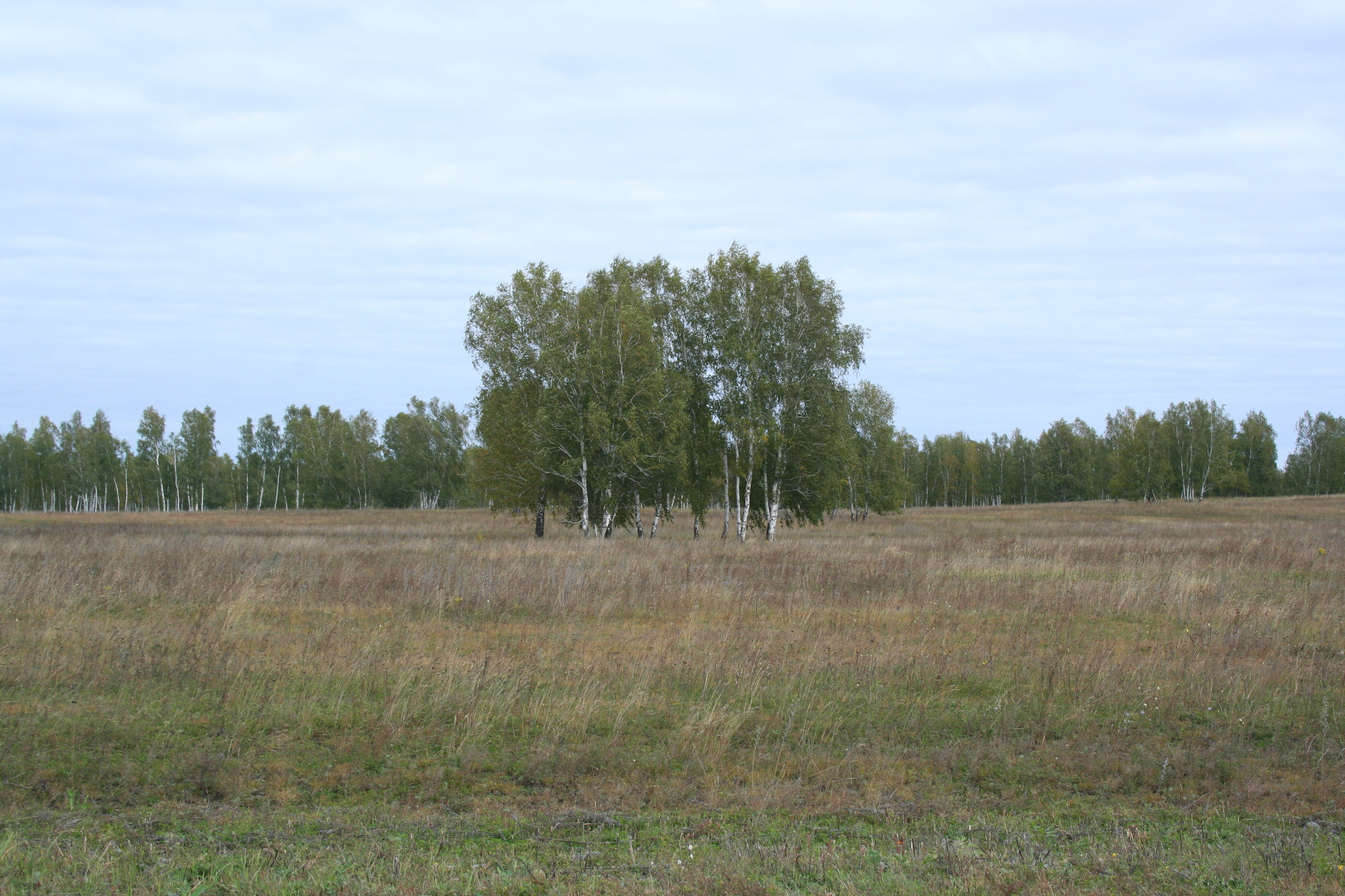 Березовые колки в левобережной части Быстроистокского района